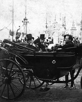 El Presidente de Argentina Julio A. Roca, recorre Buenos Aires en un carruaje, junto al Presidente de Brasil Campos Salles, el capitán Joaquim Alves de Barros y el coronel Gramajo. Año 1900.